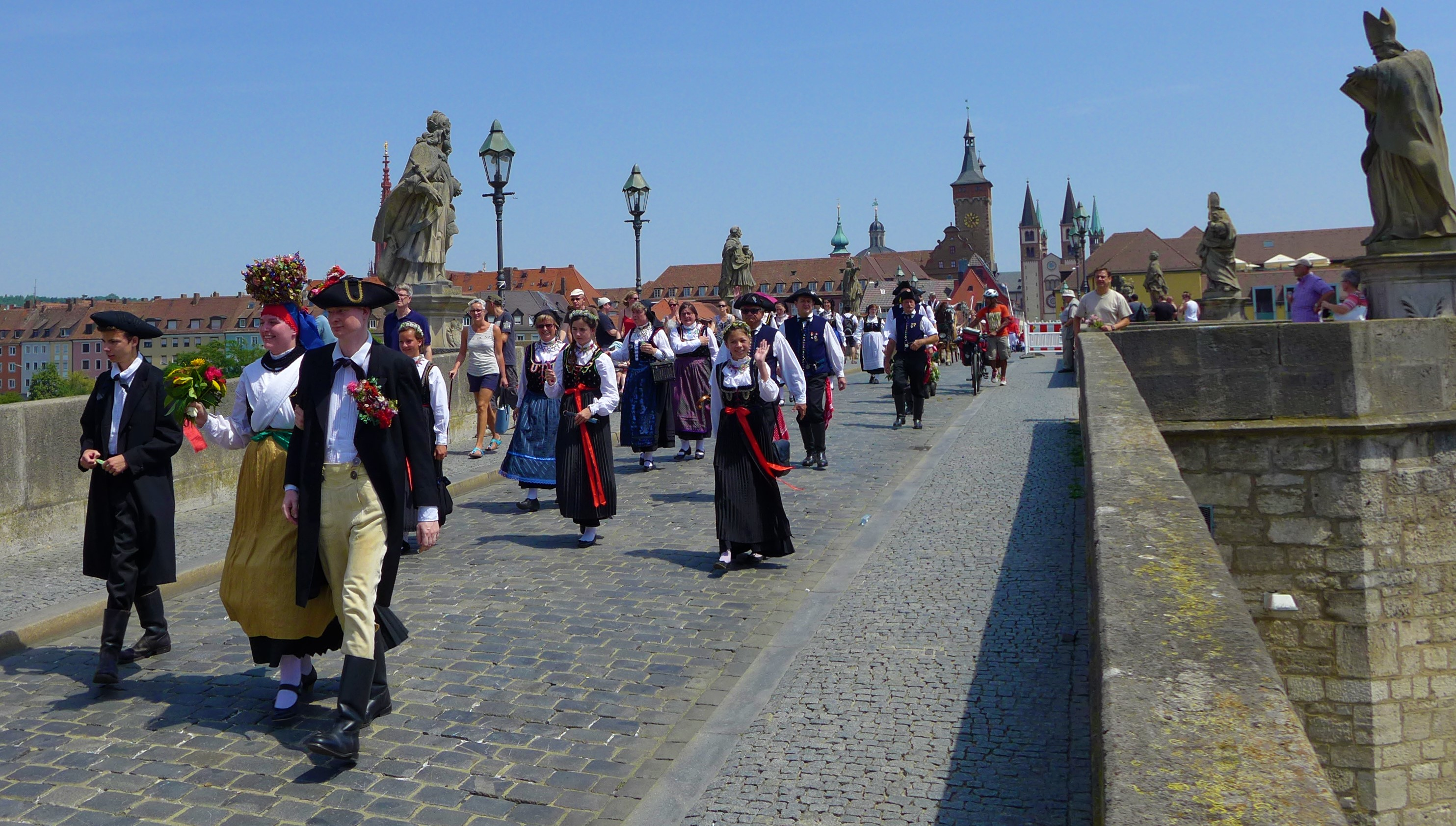 Trachten Glasofen, Kiliani-Festzug 2015